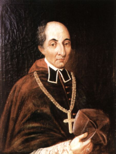 Franciszek Ksawery Zachariasiewicz (1770-1840) Bishop of Tarnów 1836 - 1840